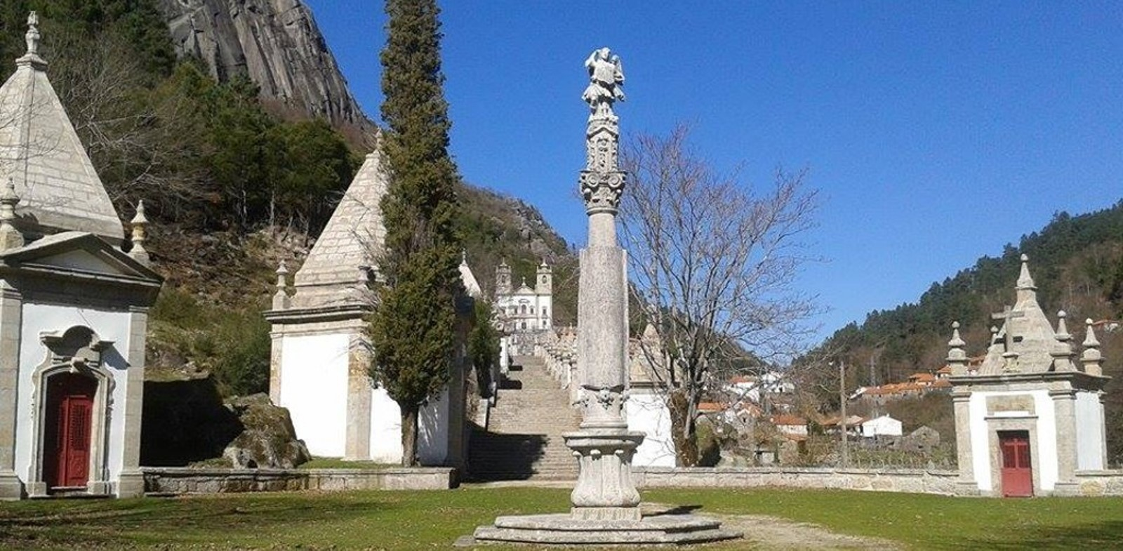 Santuário de Nossa Senhora da Peneda